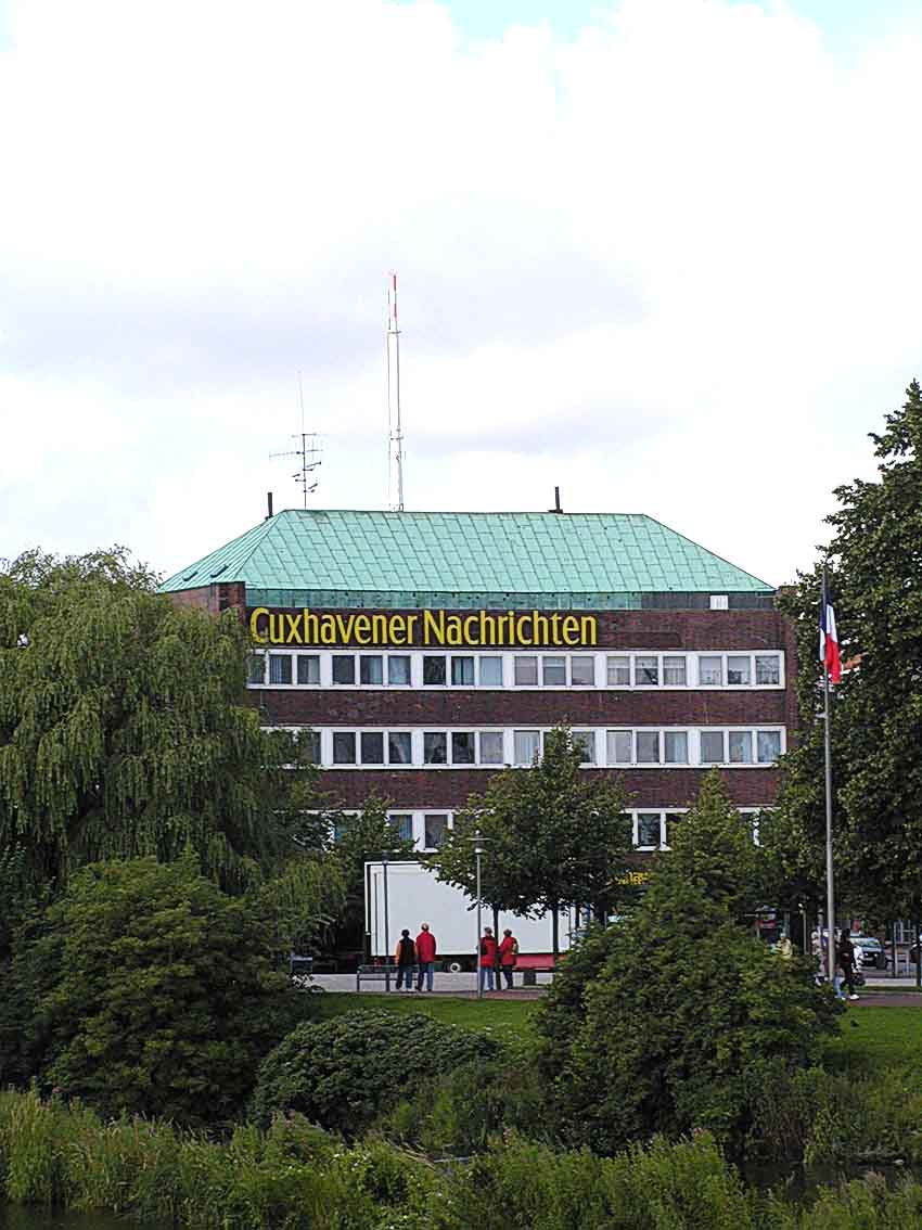 Die Cuxhavener Nachrichten am Kämmererplatz